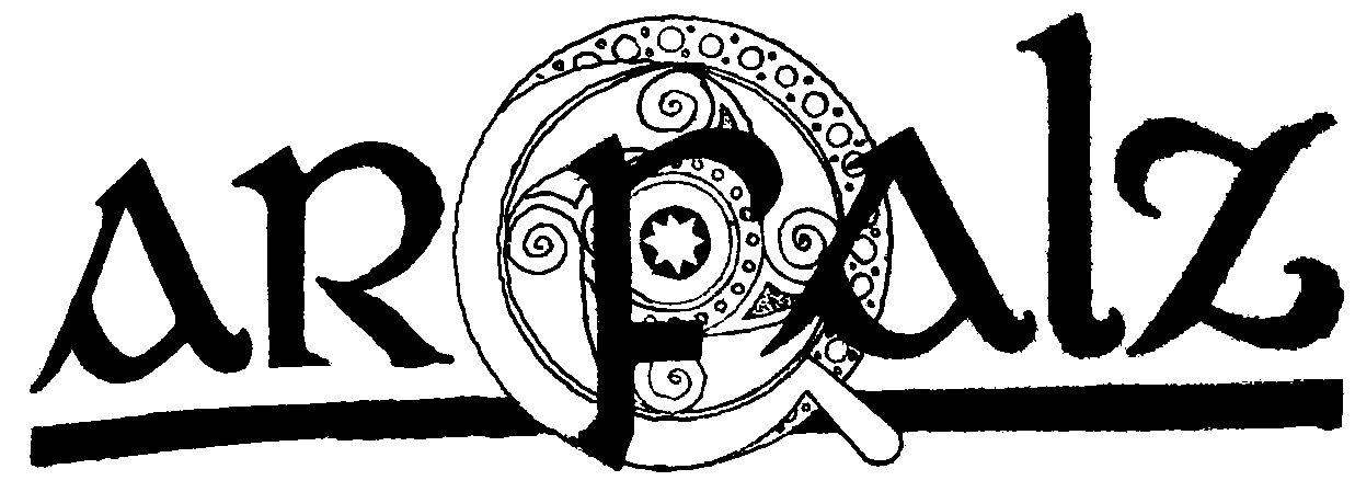 logo du journal Ar Falz en décembre 1935